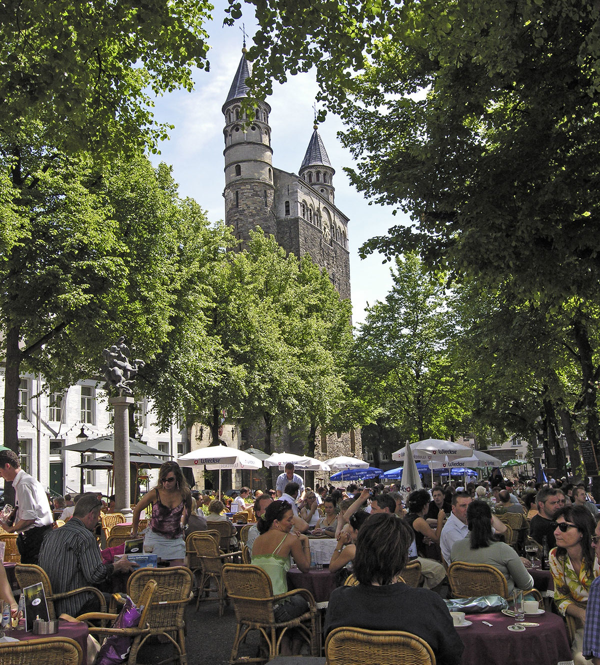 Maastricht, Platz vor der Liebfrauenkirche